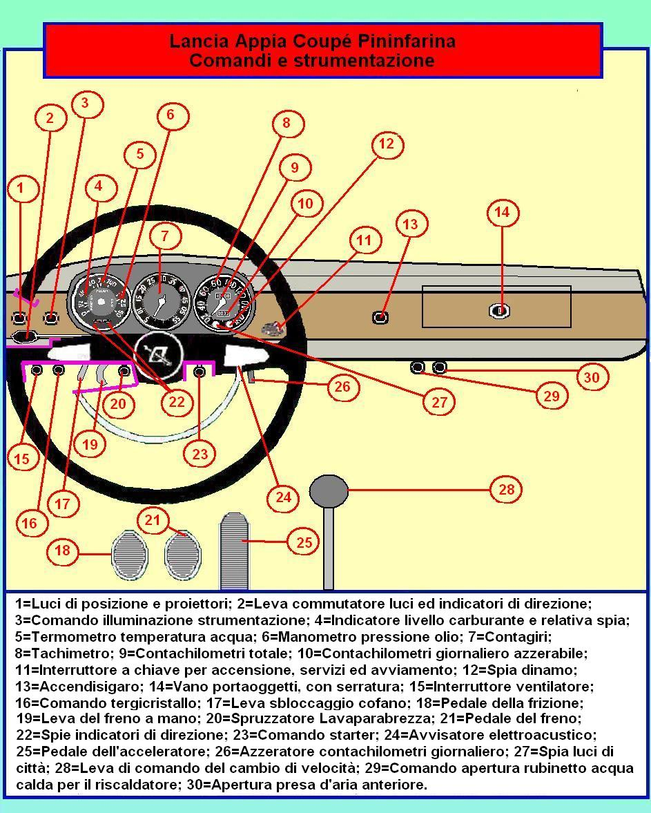 Disegno eseguito dal sottoscritto Giomayo utilizzando il programma "Paint" di Windows ed attingendo le necessarie informazioni da diverso materiale cartaceo di soggetto automobilistico